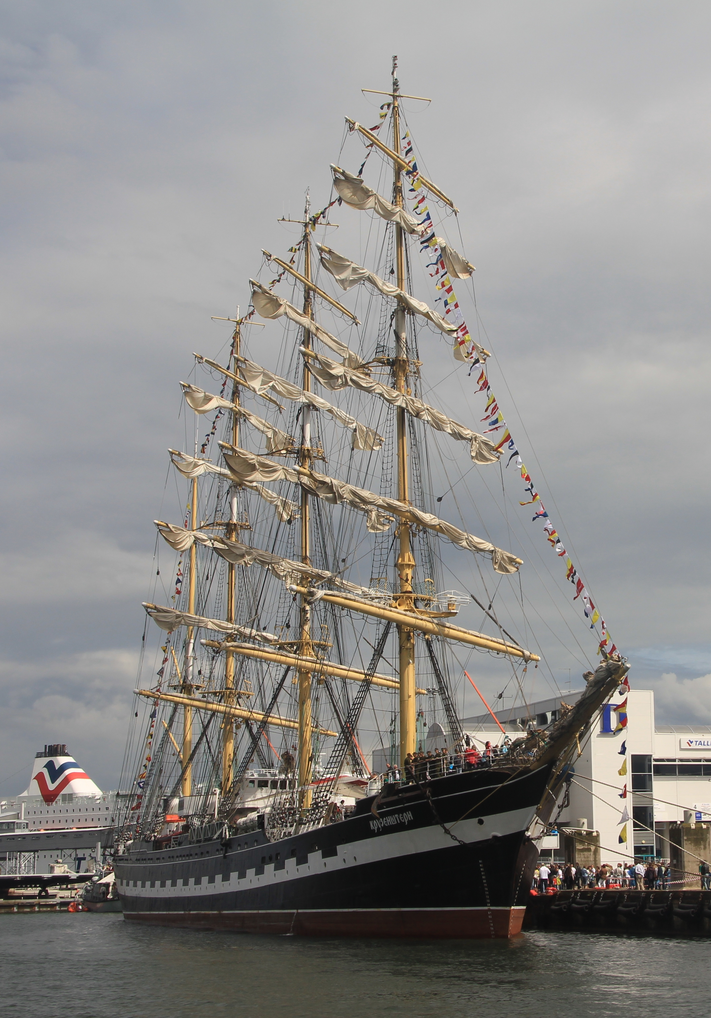 Krusenstern Tallinna sadamas merepäevadel